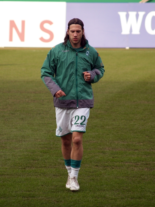 Torsten Frings im Spiel gegen den HSV